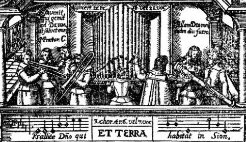 Kupferstich S. 237, Ausschnitt